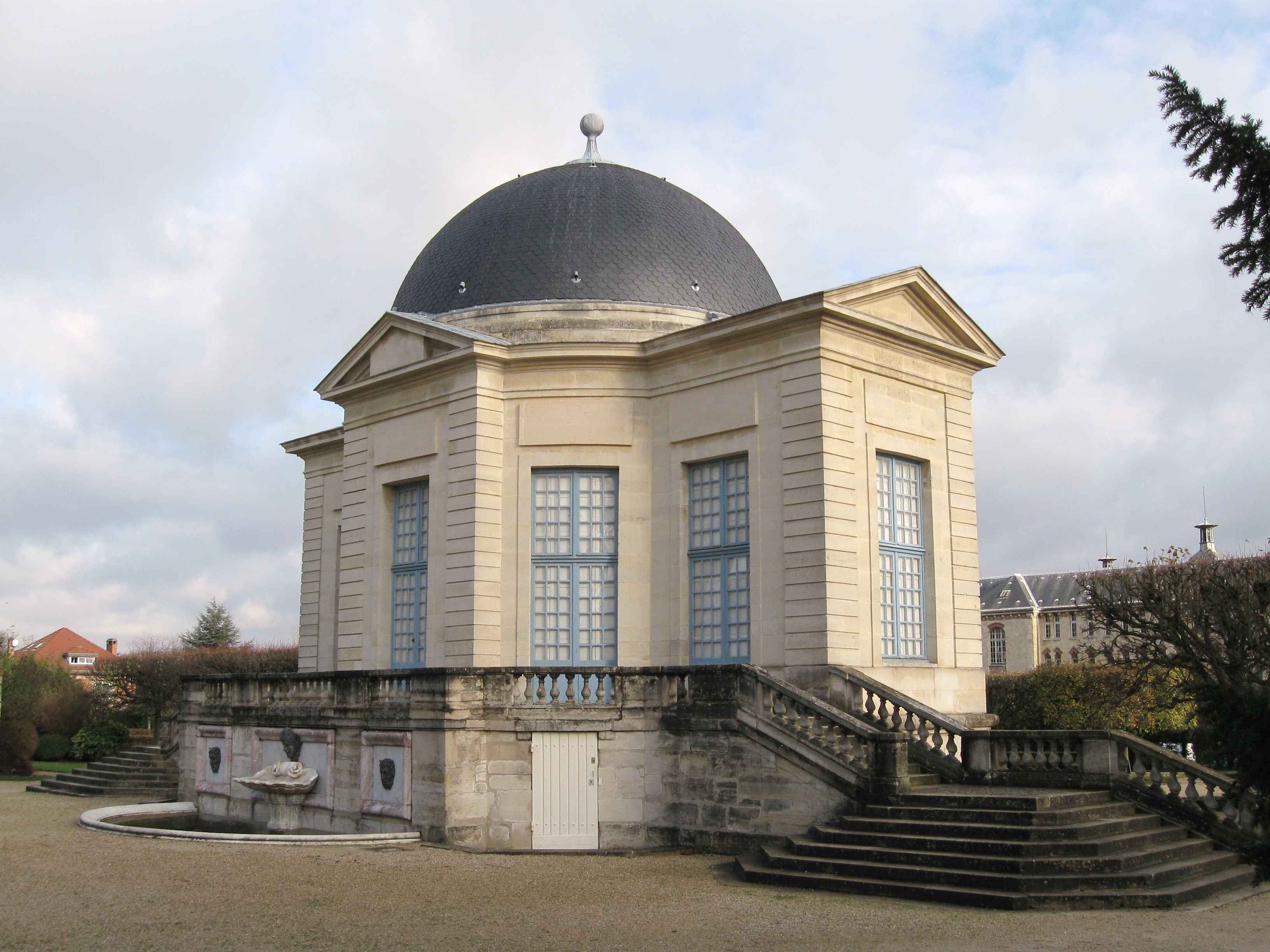 Parc de Sceaux, le Pavillon de l'Aurore, Sceaux, Hauts-de-Seine, France